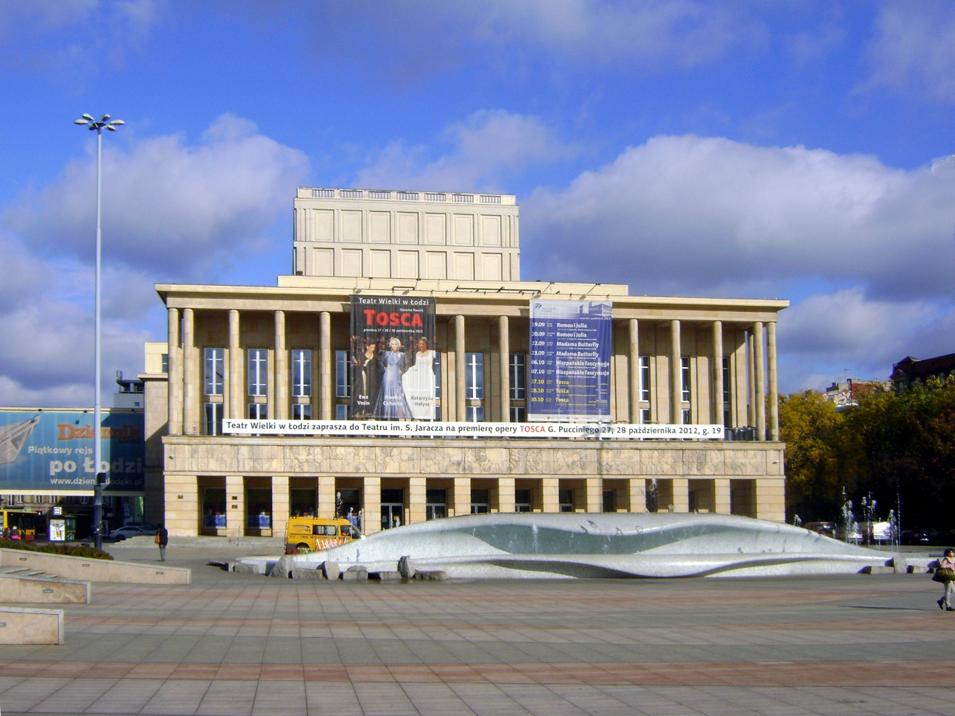 Teatr Wielki Dąbrowskiego plac, Miasto Łódź